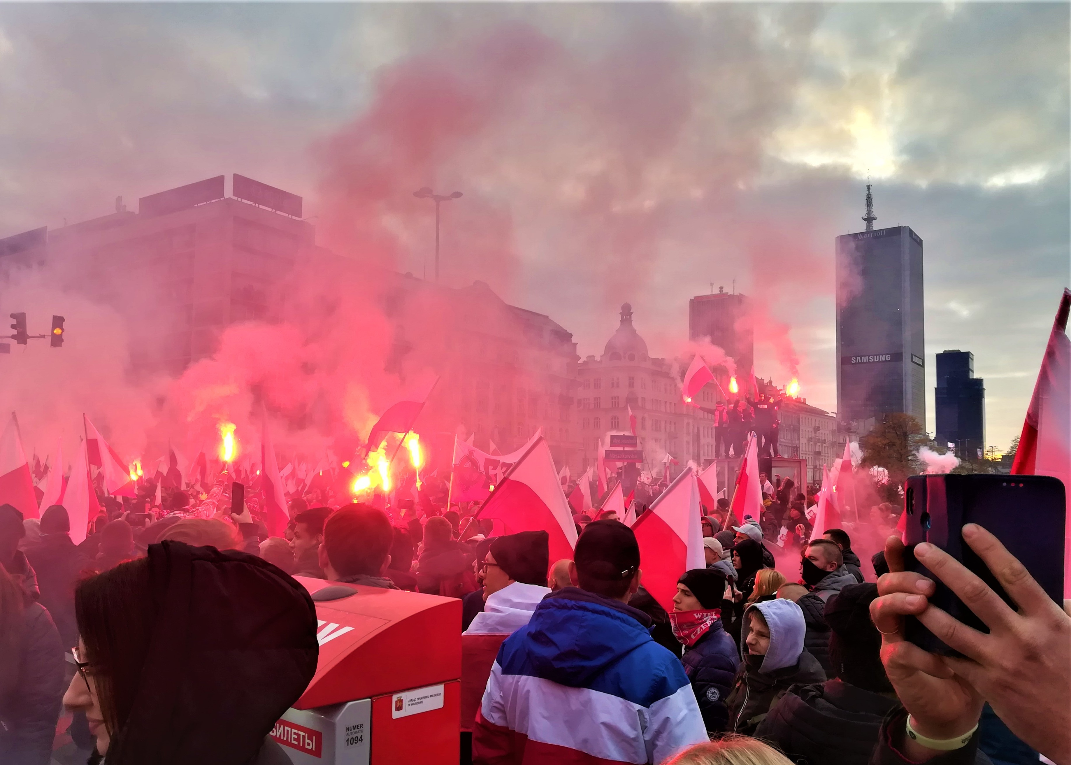 Marsz Niepodległości w Warszawie w 2019 r.